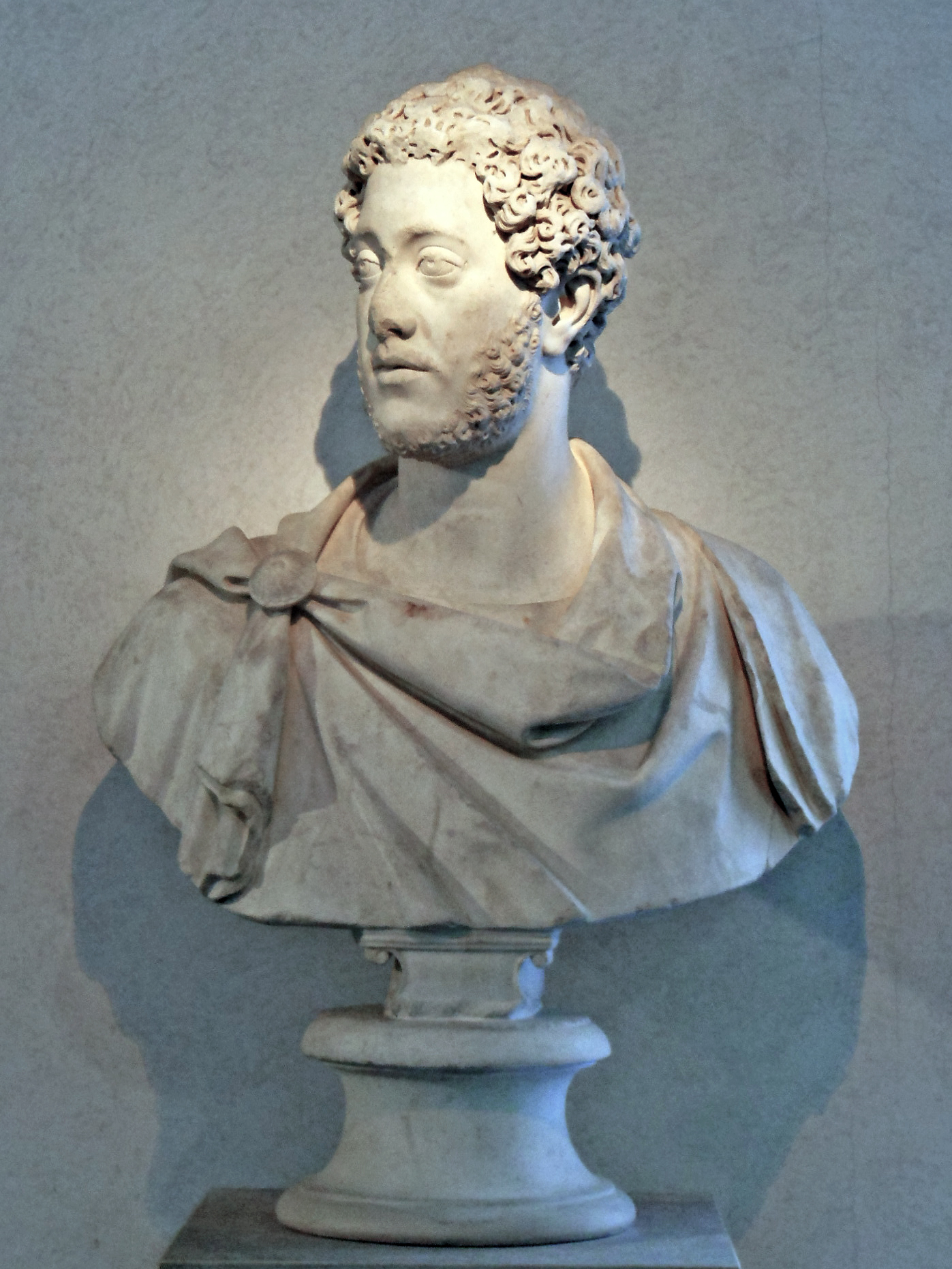 Ritratto di Commodo da Albano - 180 d.C. circa - Museo nazionale romano a palazzo Massimo alle terme